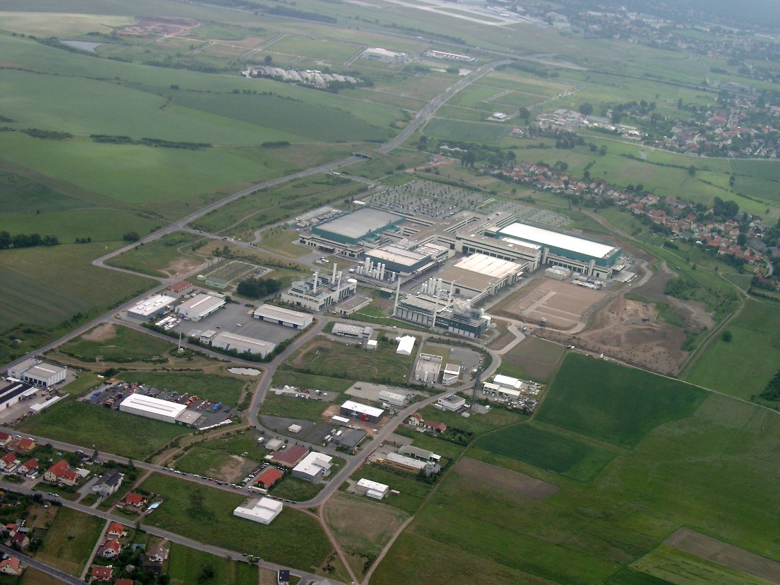 Luftbild der AMD Chipfabrik Dresden